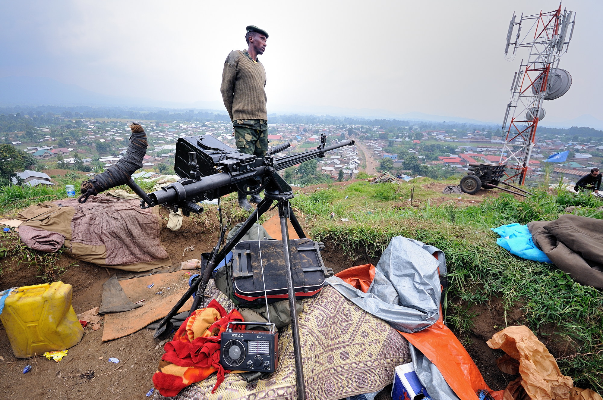 Milicianos del movimiento M23 and Type 85 heavy machine gun